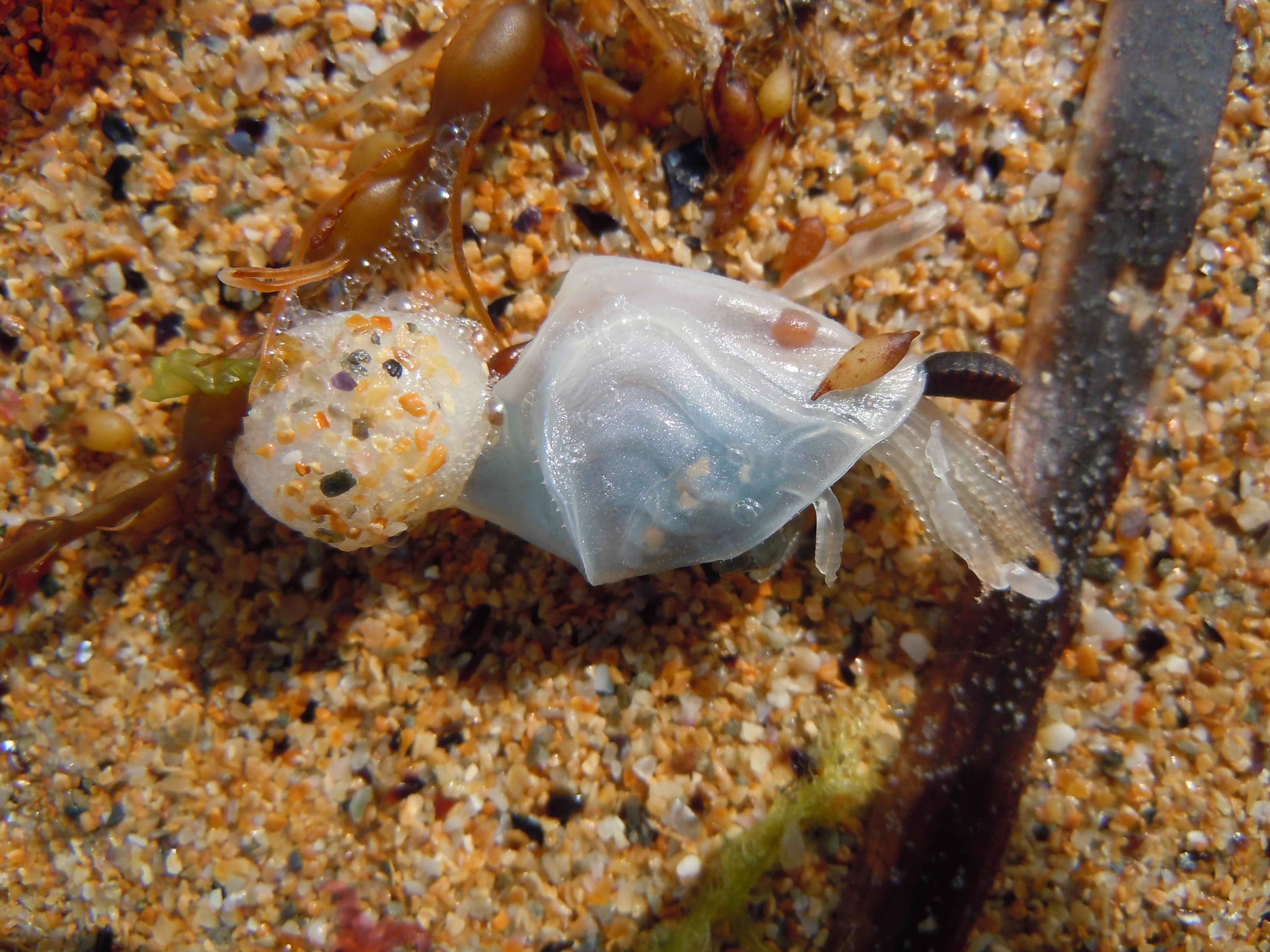 Dosima fascicularis échoué sur la Plage de Donnant , à Belle-Île-en-Mer.